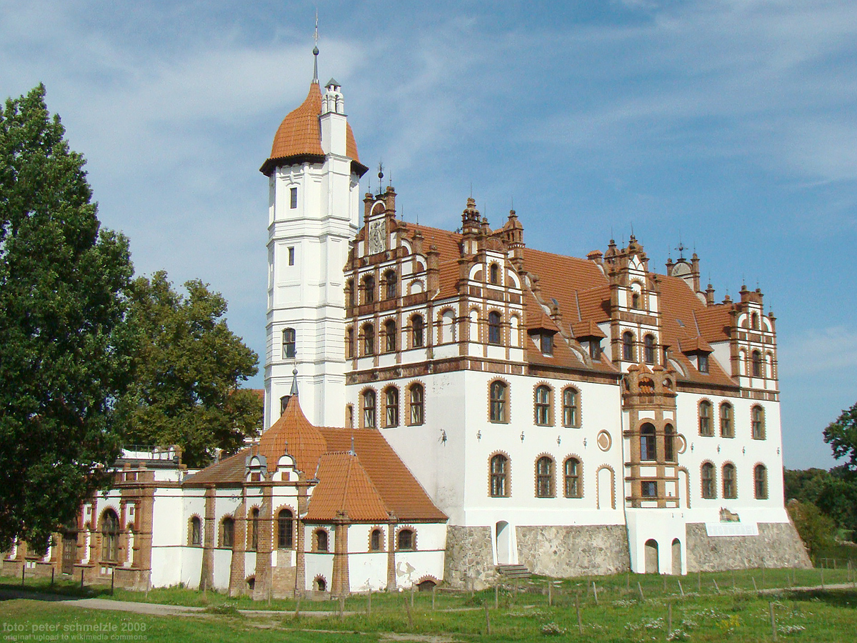 Schloss Basedow